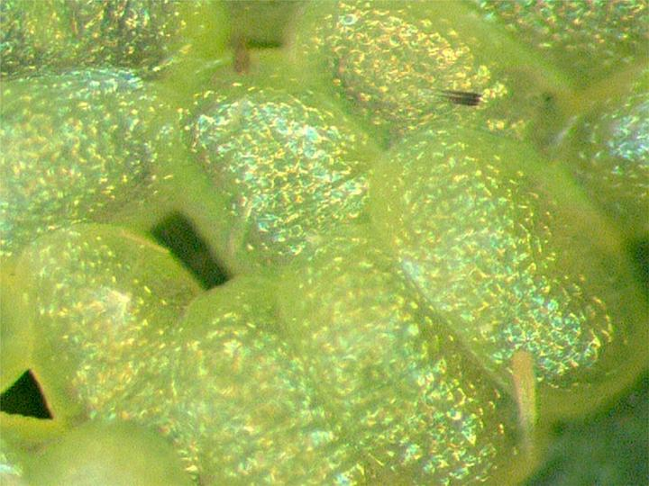 Plutella xylostella eggs